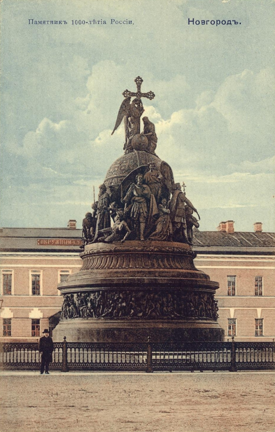 Памятник Тысячелетие России. Открытка.